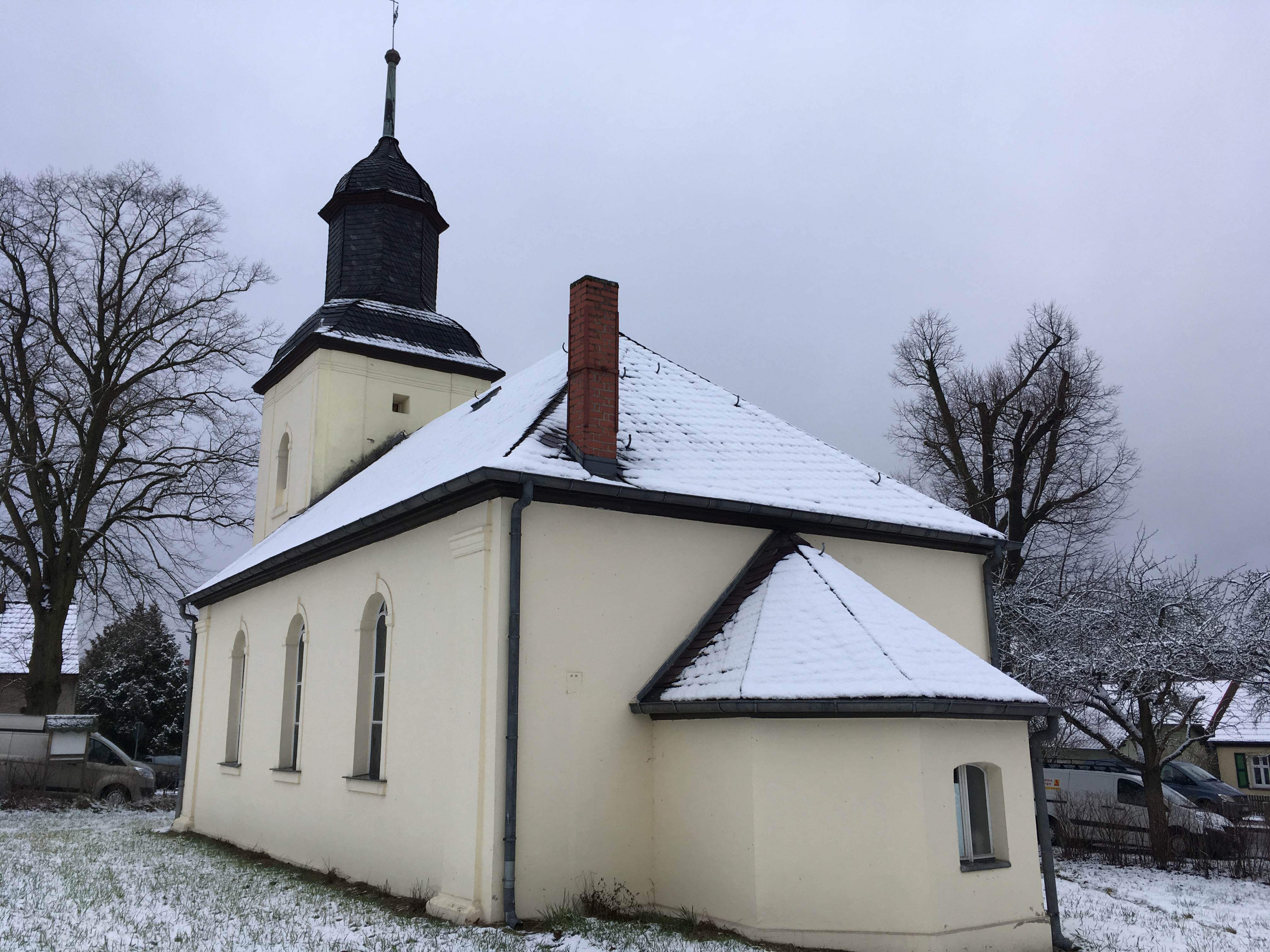 Die Dorfkirche Ließen ist eine barocke Saalkirche aus dem frühen 18. Jahrhundert und gehört zur Stadt Baruth/Mark im Landkreis Teltow-Fläming in Brandenburg. Im Innern hängt unter anderem ein Taufengel aus dem Anfang des 18. Jahrhunderts.